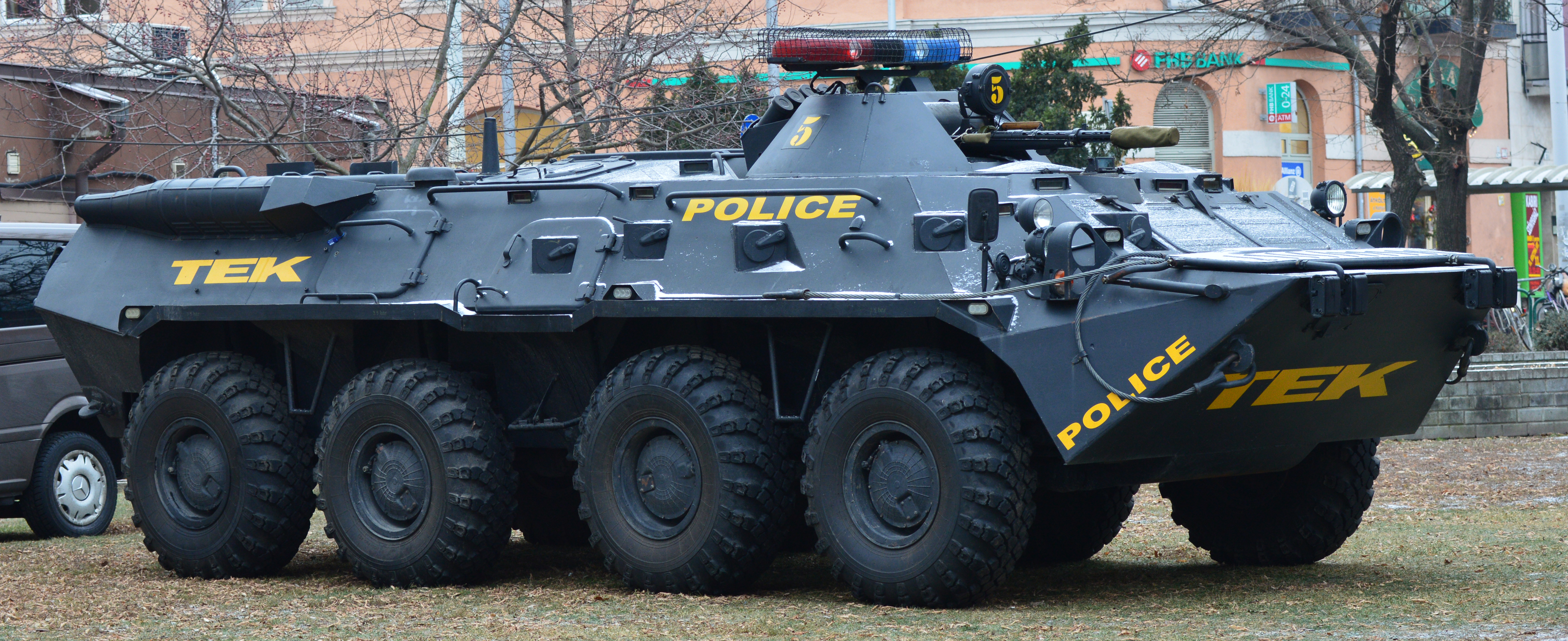 BTR-80 TEK